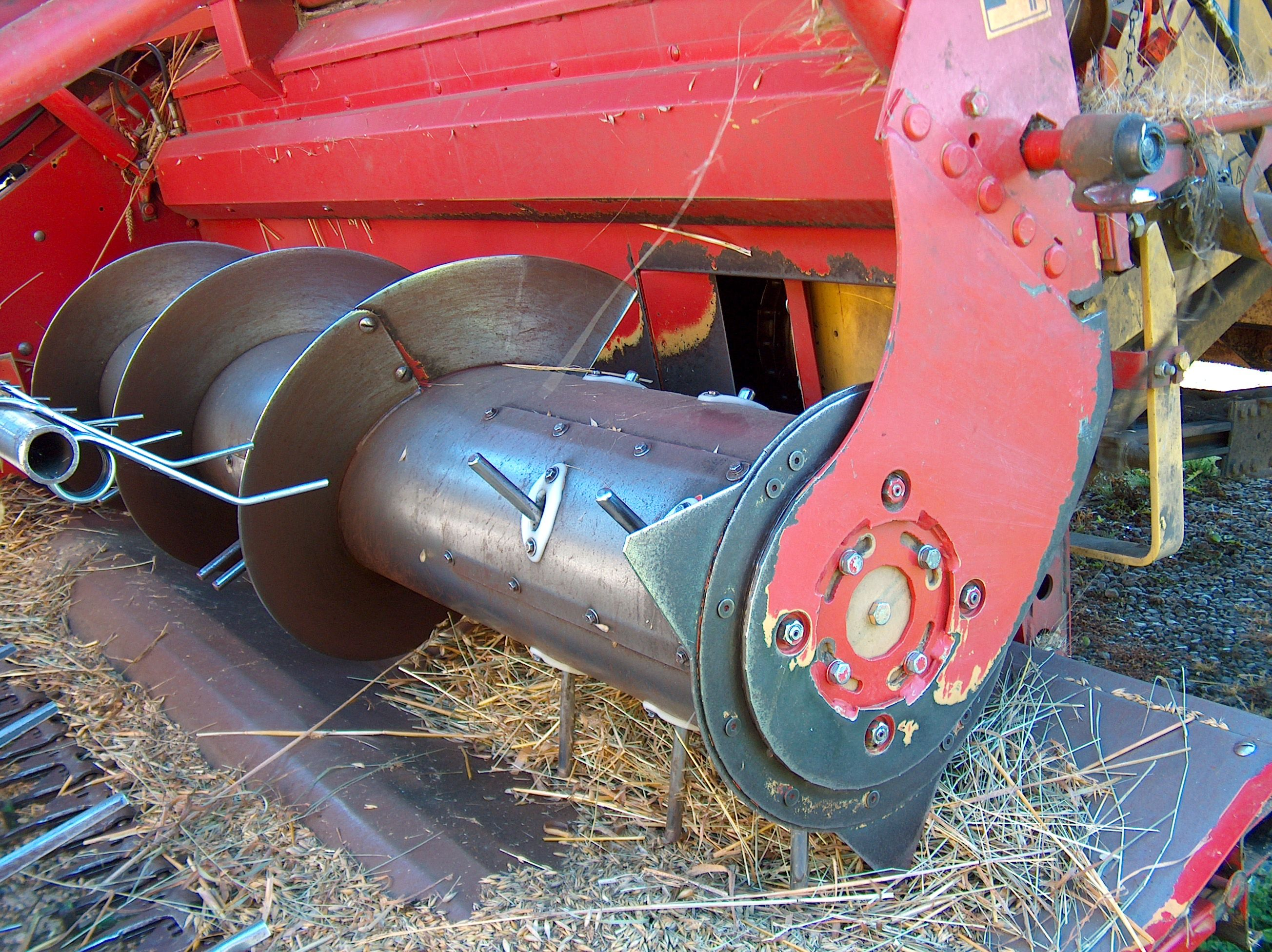 Schnecke eines klappbaren Mähwerks von Geringhoff an einem New-Holland-Mähdrescher